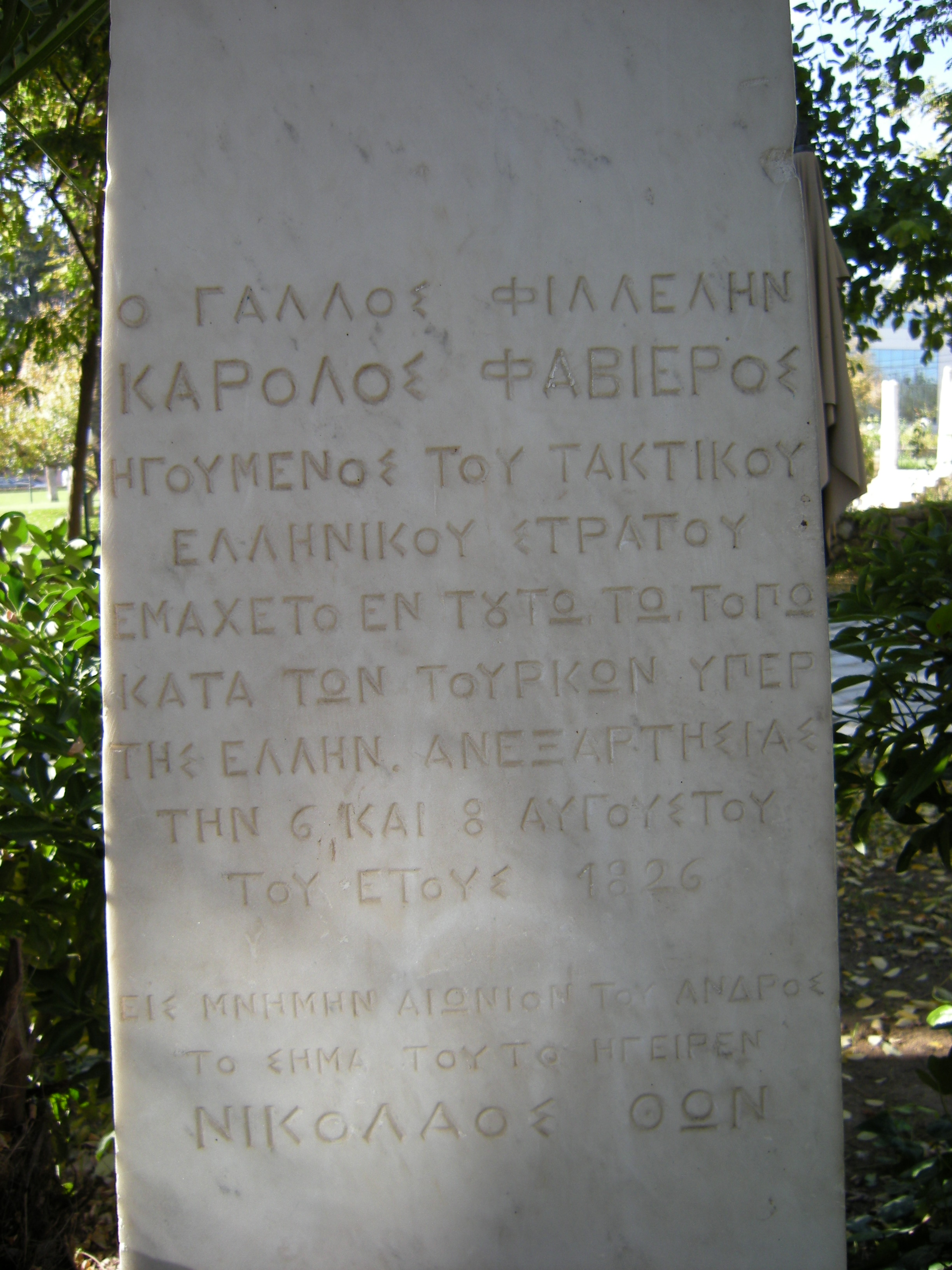 Το Μνημείο Κάρολου Φαβιέρου είναι ίσως το παλιότερο μνημείο του Χαϊδαρίου, αφού φιλοτεχνήθηκε με πρωτοβουλία του Νικολάου Θων προς τιμήν του φιλέλληνα Κάρολου Φαβιέρου για την συμβολή του στις μάχες του Χαϊδαρίου στις 6 και 8 Αυγούστου 1821. Σήμερα η προτομή είναι αποκομμένη από την μαρμάρινη στήλη, η οποία συνεχίζει να κοσμεί τον περίβολο της έπαυλης Παλατάκι ,μπροστά από το αναψυκτήριο «Ιστορικόν». Το στηθαίο του μνημείου βρίσκεται σήμερα στην αίθουσα Δημοτικού Συμβουλίου στο νέο Δημαρχείο ,αφού υπέστη εργασίες συντήρησης.